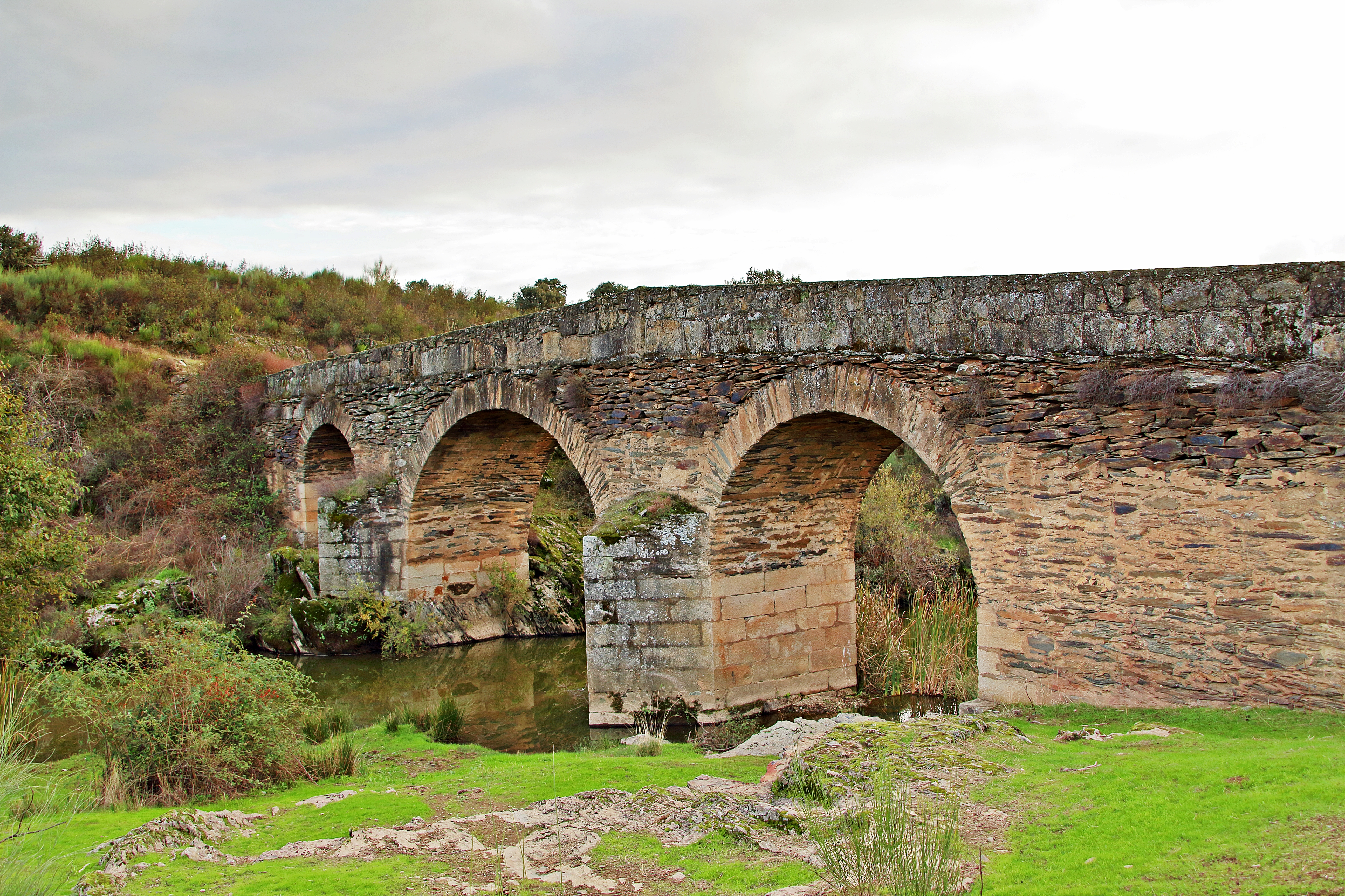 Ahigal, municipio de la comarca de Trasierra-Tierra de Granadilla, provincia de Cáceres